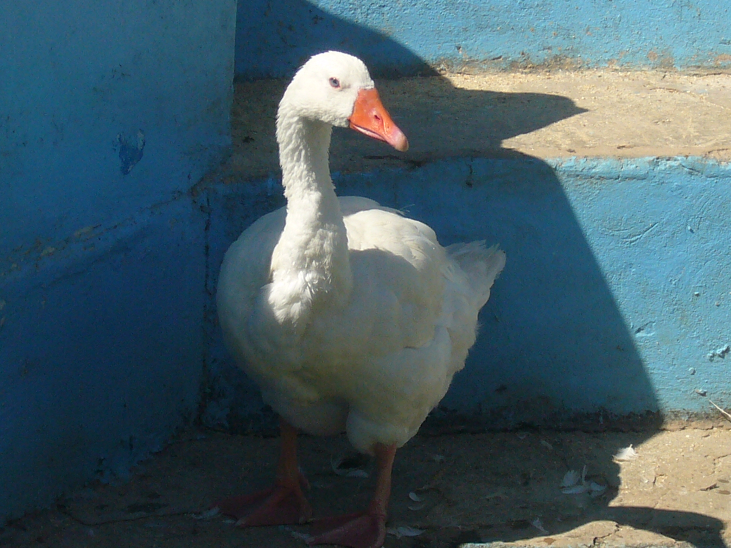 Oie